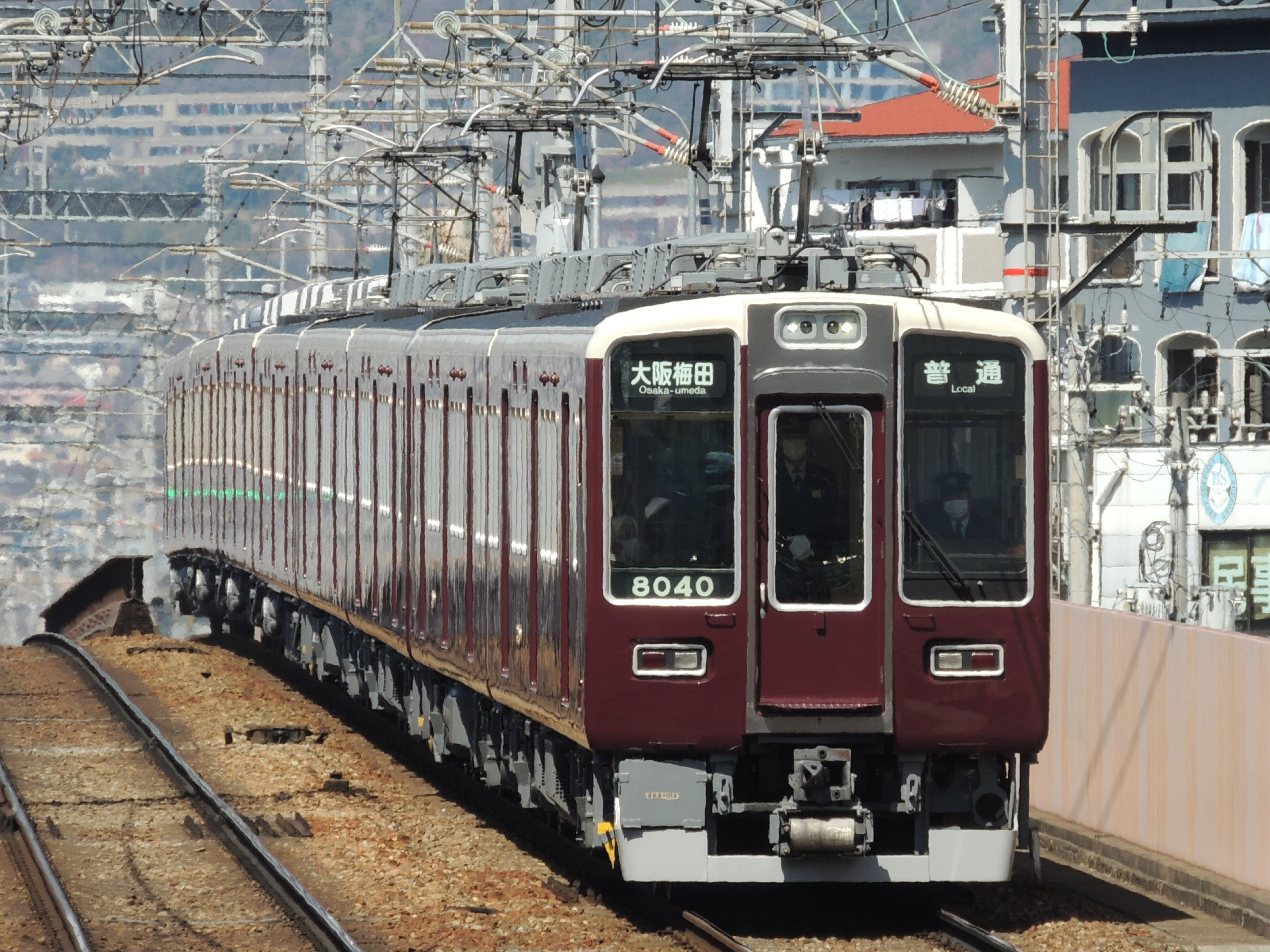 Hankyu 8040F8R